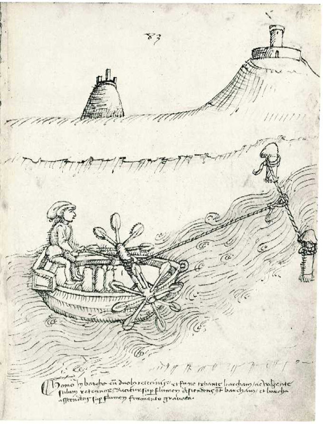 ship.